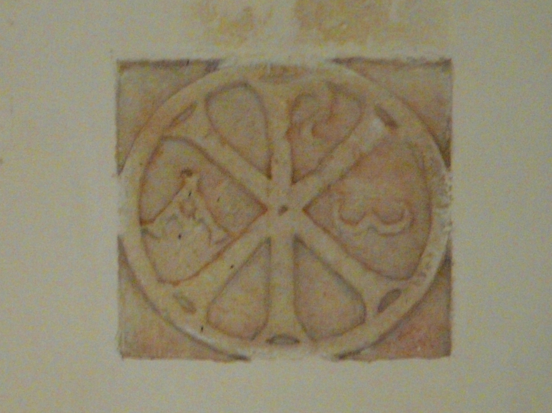 Chrisme enchâssé dans l'arc séparant la nef du chœur, église Sainte-Madeleine, Dordogne, France